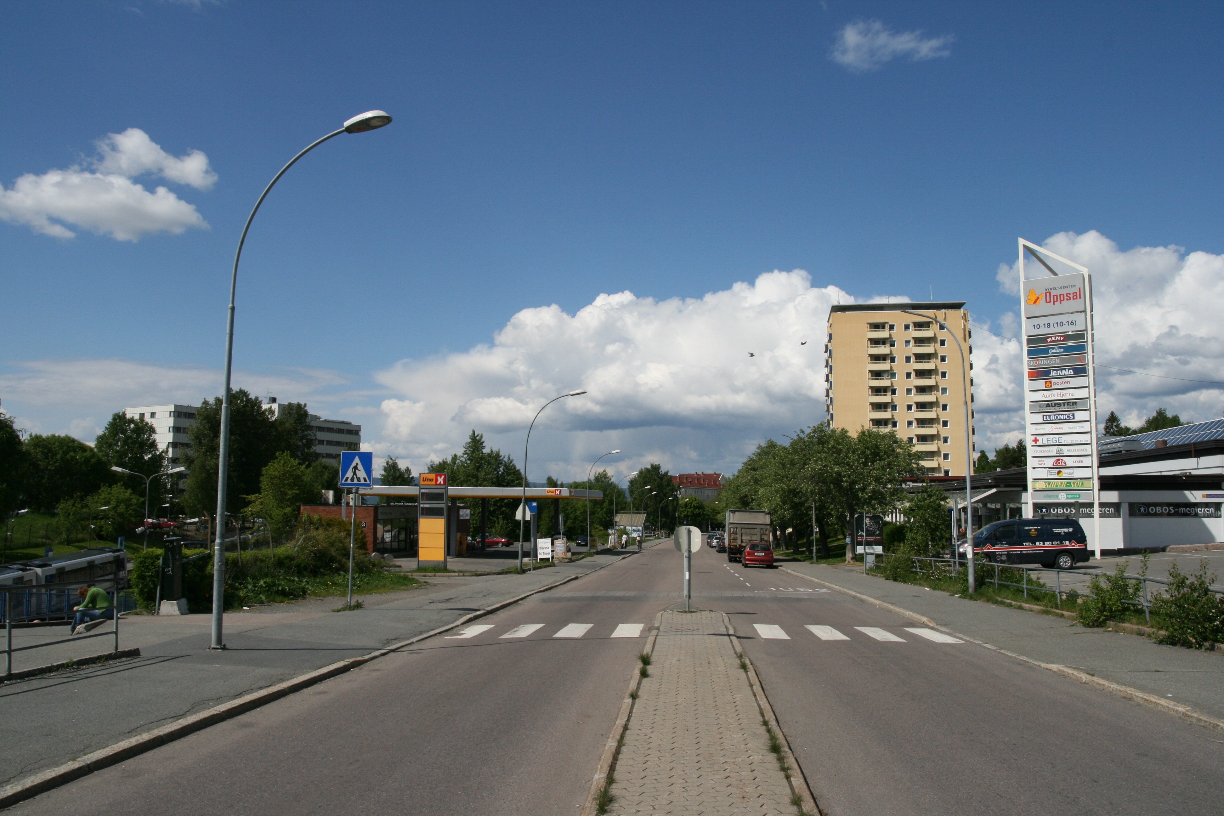 Haakon Tveters vei på Oppsal i Oslo